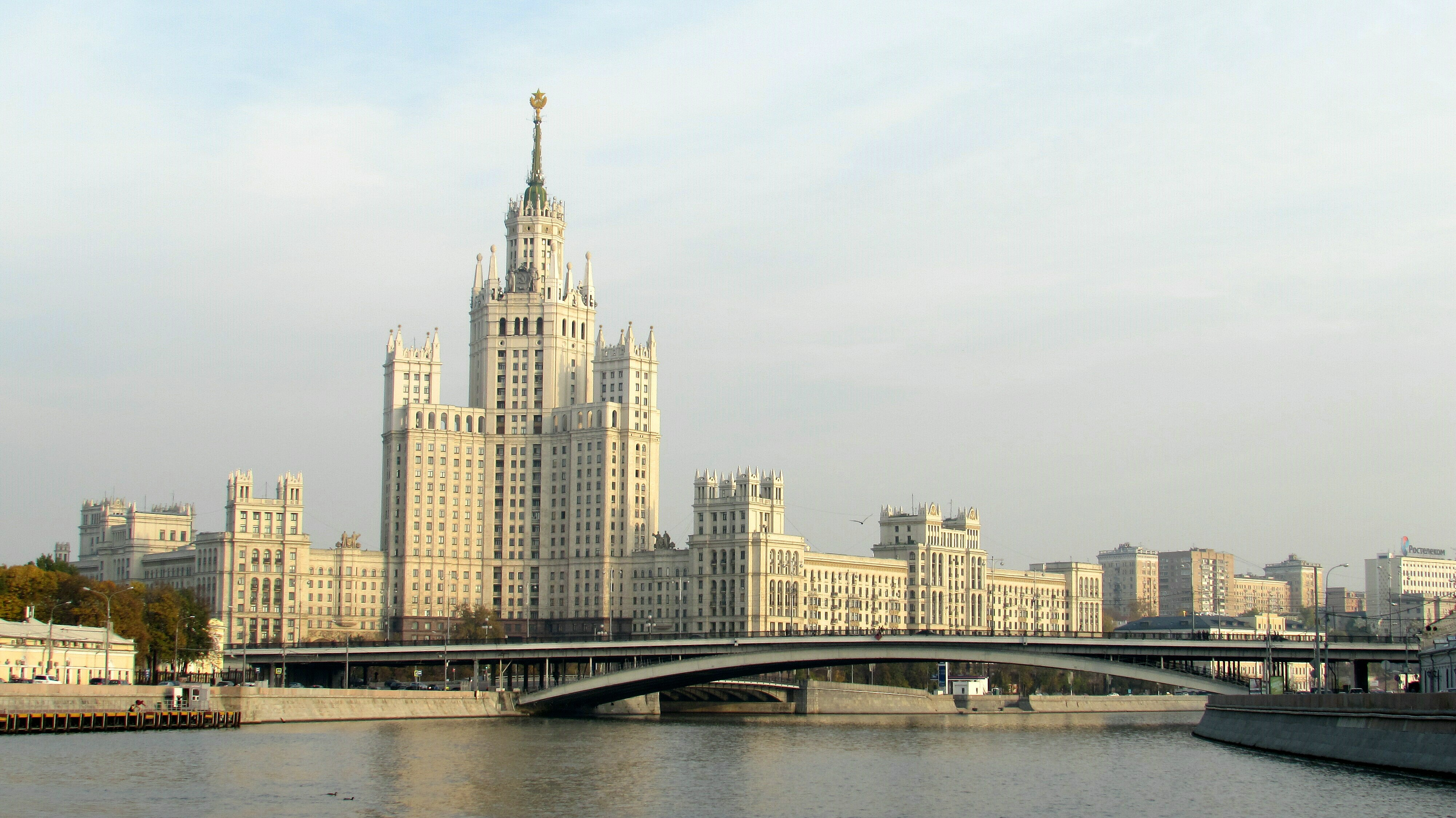 MoskauWohnhausKotelnitscheskaja-Uferstrasse